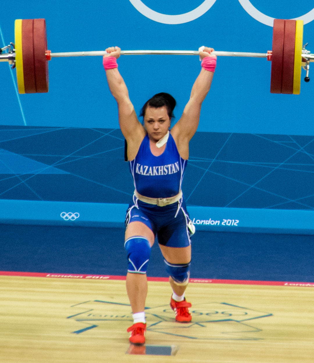 Svetlana Podobedova